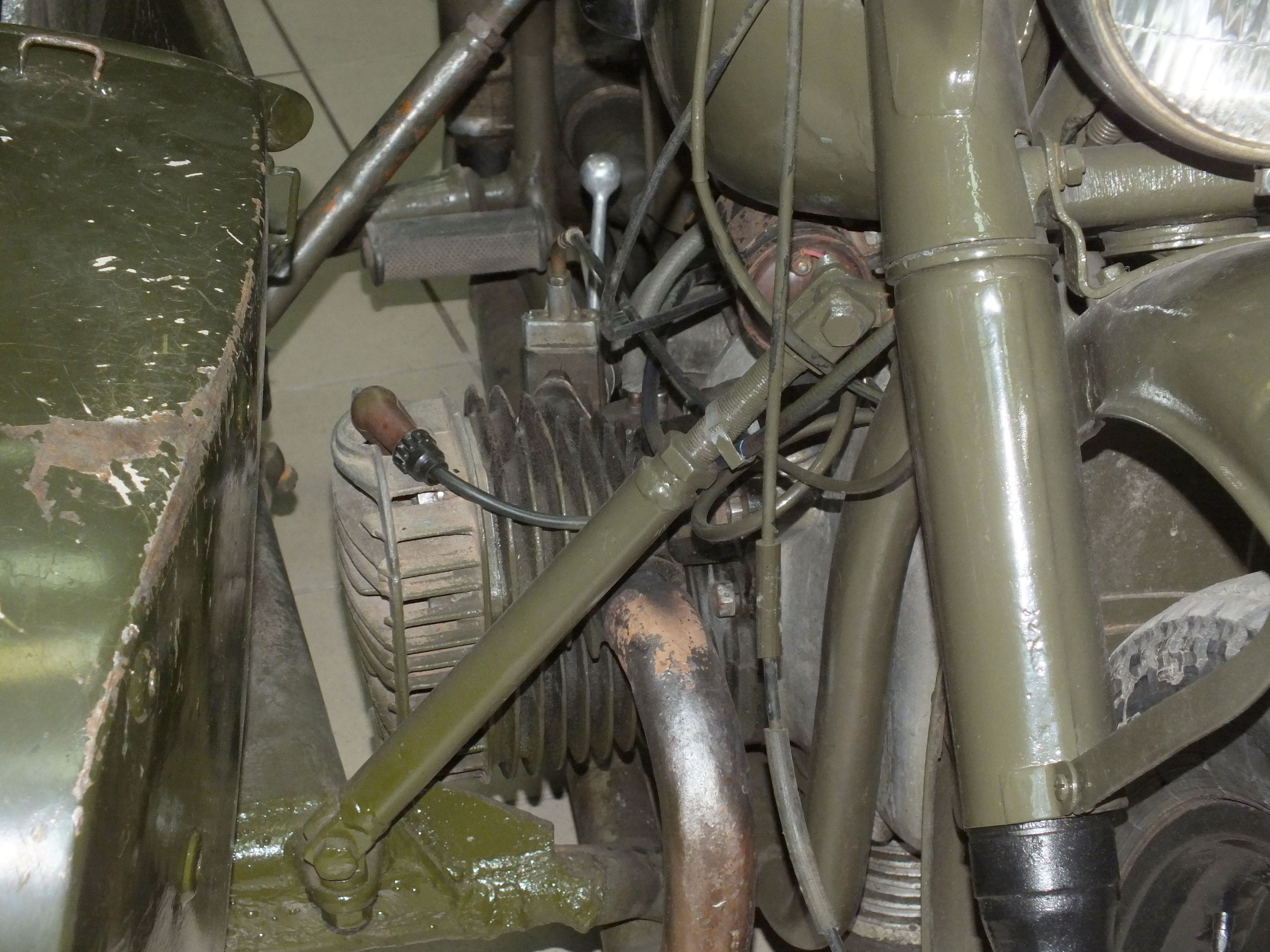 Мотоцикл M-72